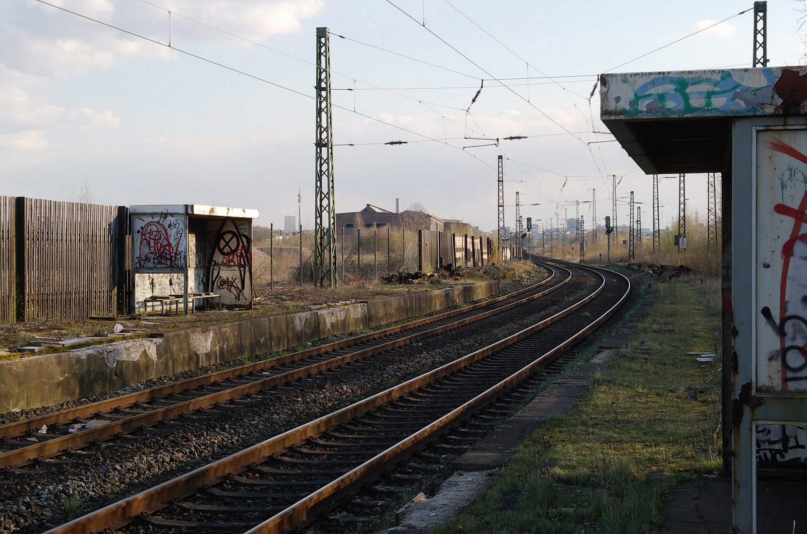 Überreste des Bahnhofs Dortmund-Hoesch 2008, Blick in Fahrtrichtung Do-Hauptbahnhof